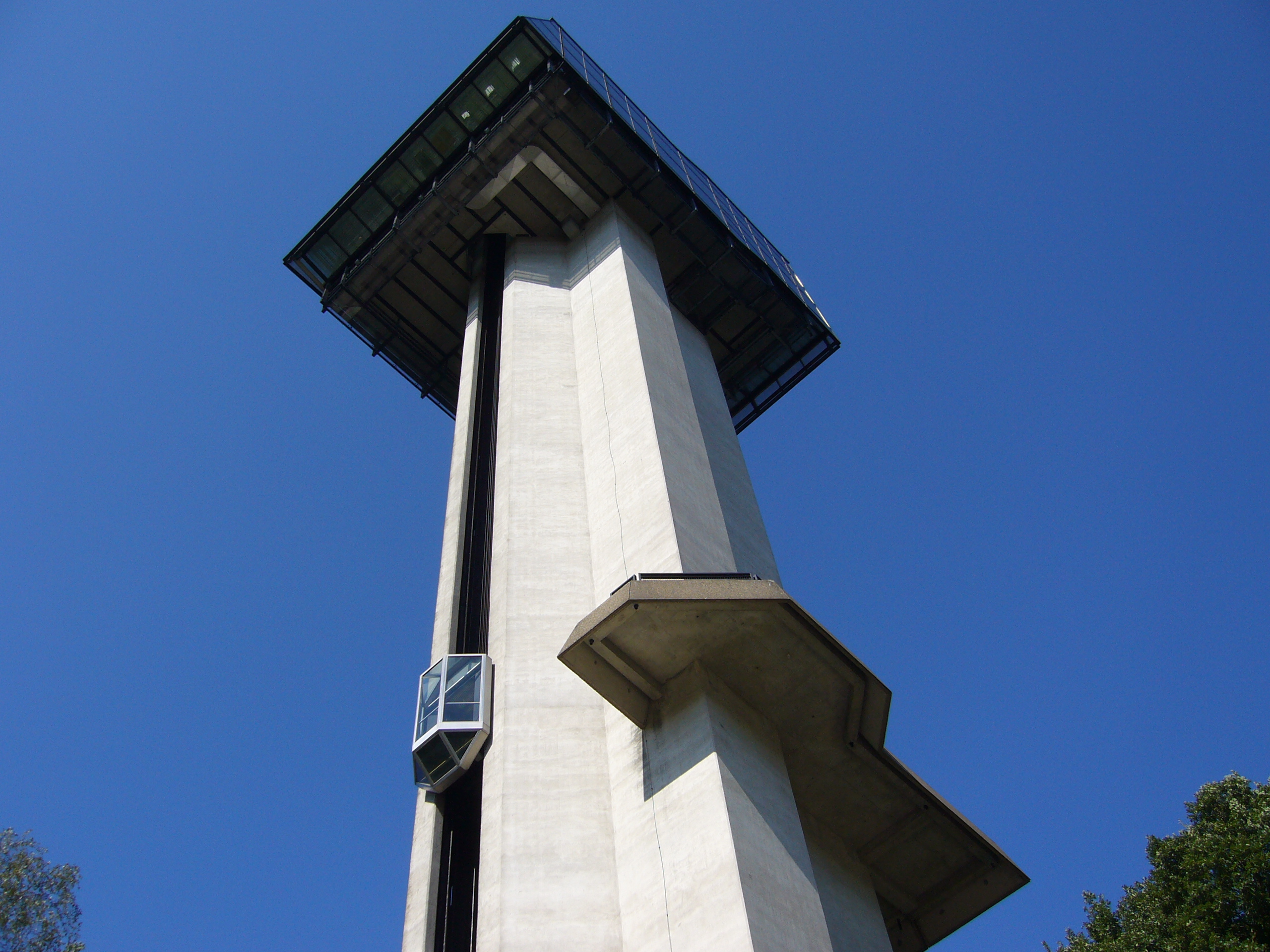 Photo personnelle, la tour panoramique de la Gileppe.